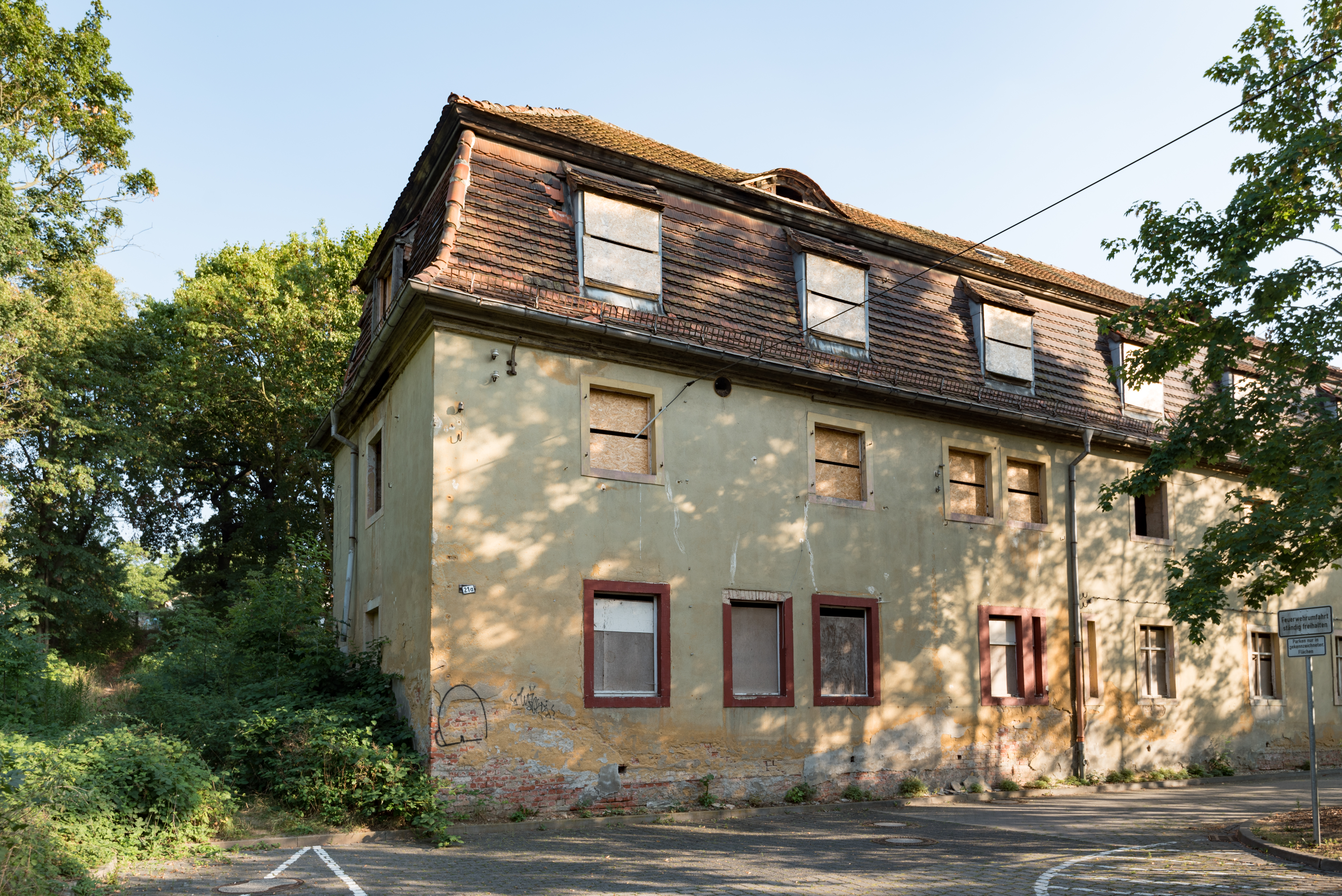 Weißenfels, Alte Leipziger Straße 21a